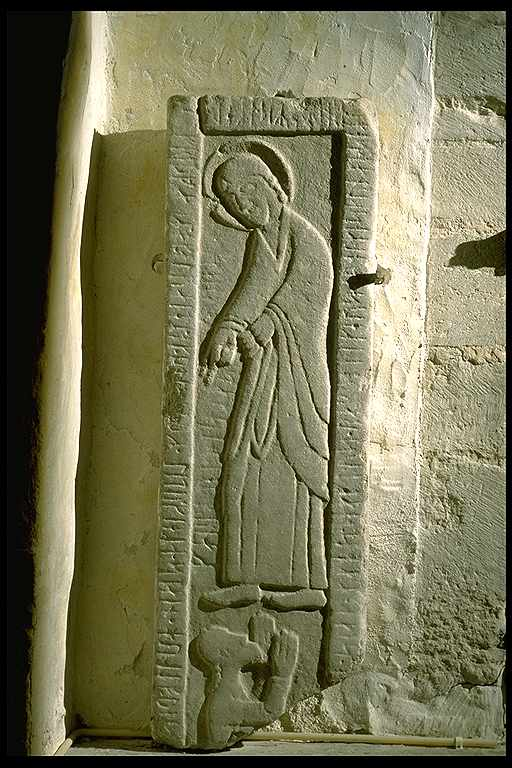 Medeltida gravhäll, G199. Inskriften lyder: Fridgair och Alvald och Rodaid lät göra denna gravvård av sten efter Rodorm, fader .. hans själ. Må sankt Bartolomeus utverka misskund åt Rodorms själ. Amen (?) .. Saxe högg runorna. Motiv: Tofta kyrka Nyckelord: Runor Kategori: (09) Gravar Medeltida gravhäll, G199. Inskriften lyder: Fridgair och Alvald och Rodaid lät göra denna gravvård av sten efter Rodorm, fader .. hans själ. Må sankt Bartolomeus utverka misskund åt Rodorms själ. Amen (?) .. Saxe högg runorna.